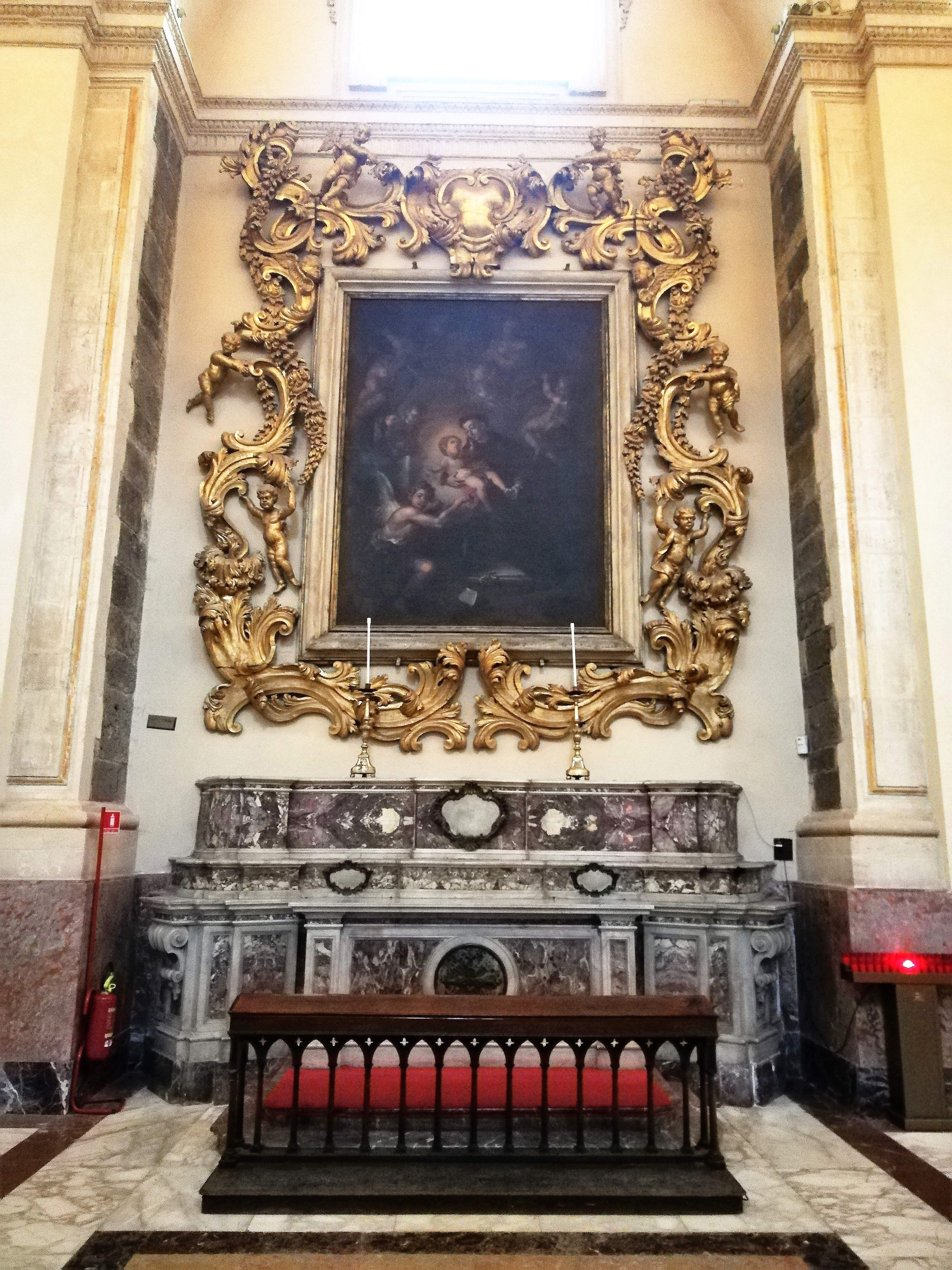 Cappella di Sant'Antonino di Padova, dipinto raffigurante Sant'Antonino, opera di Guglielmo Borremans.